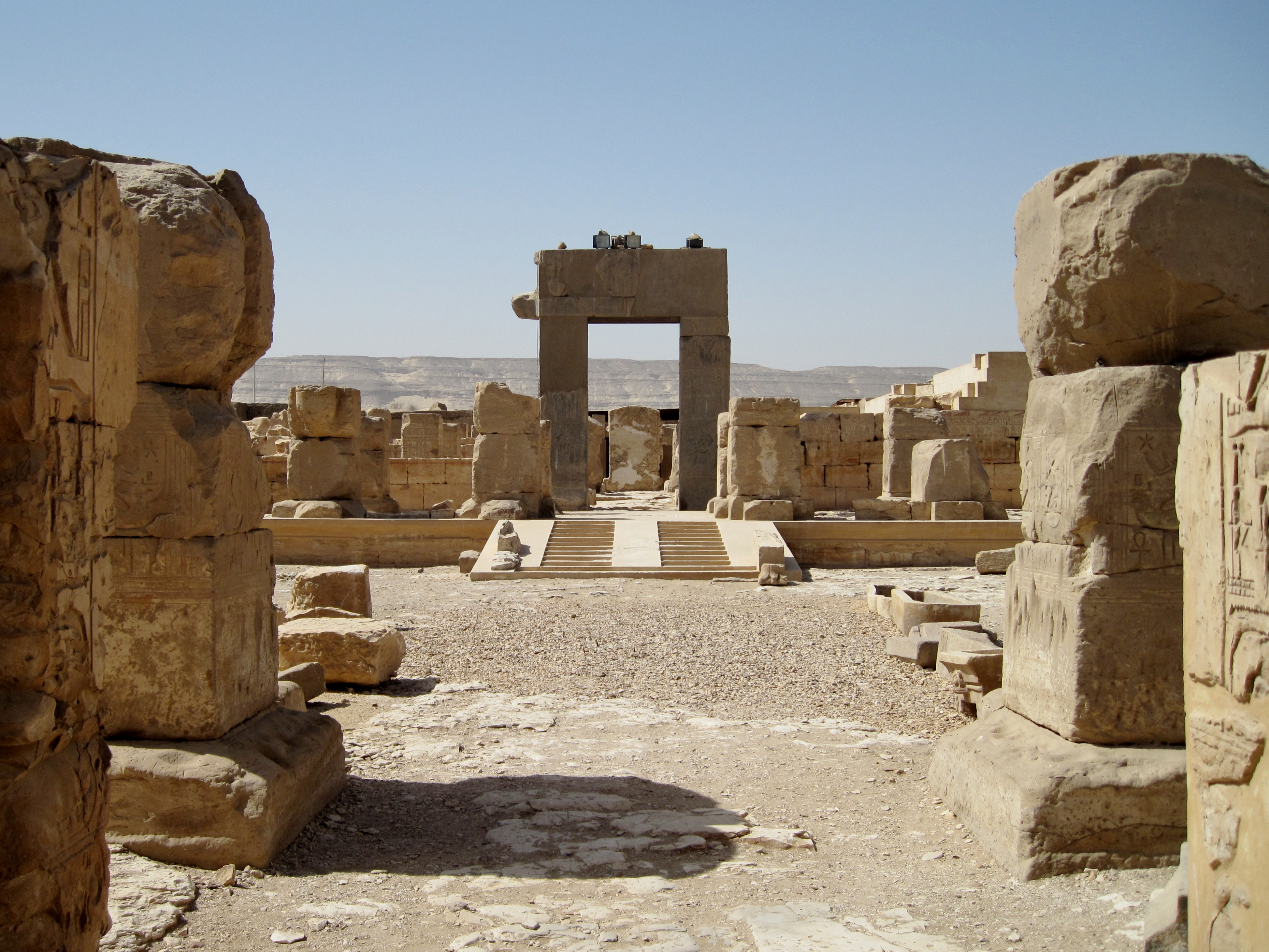 Zweiter Hof des Tempels Ramses II. in Abydos, Ägypten